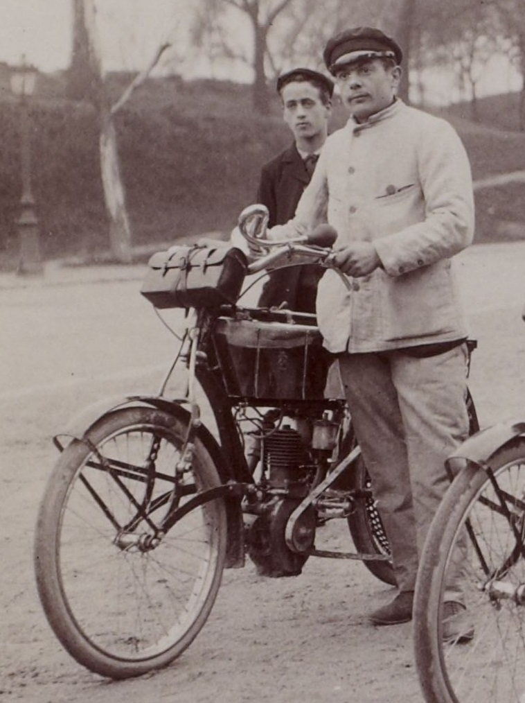 [Collection Jules Beau. Photographie sportive] : T. 29. Année 1905 / Jules Beau : F. 32v. [Tour de France pour motocyclettes, Paris - Dijon - Saint-Etienne - Avignon - Marseille - Nîmes - Toulouse - Limonges - Orléans - Paris, organisé par l' Autocycle Club de France et Les Sports, 6 - 14 mai 1905]